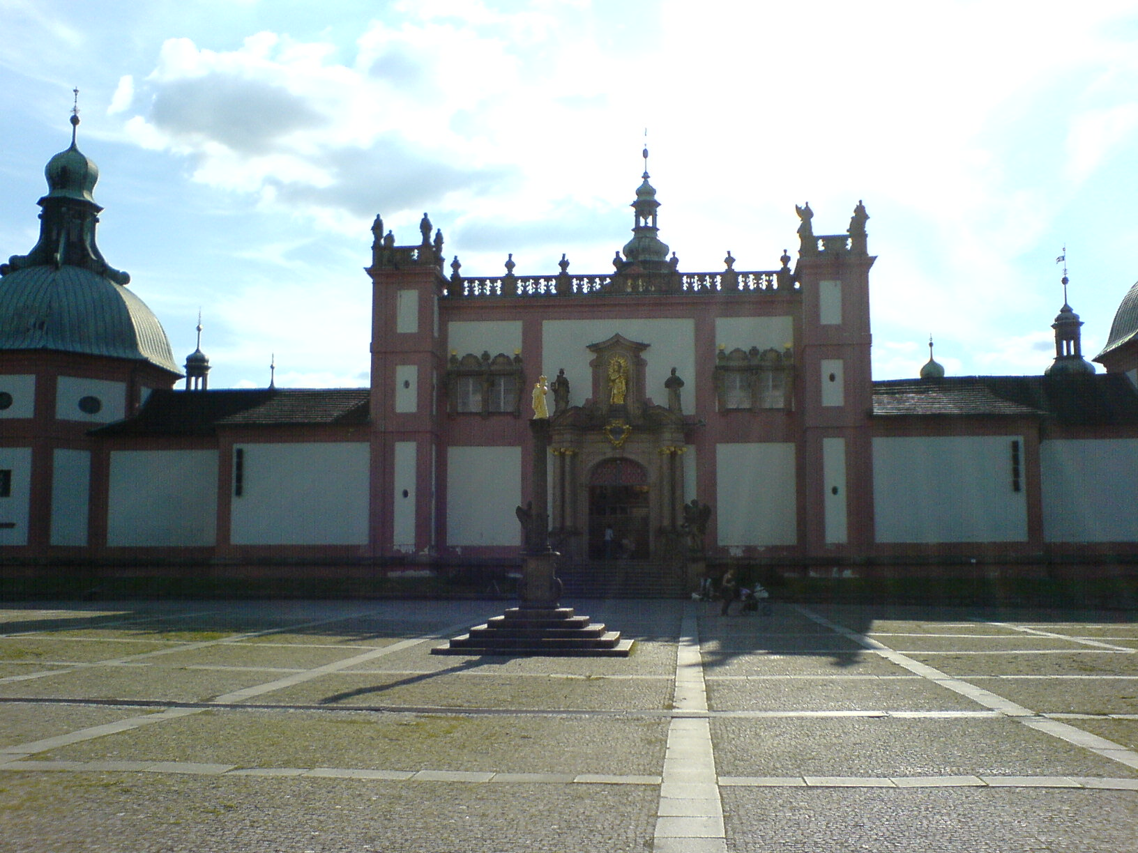 Příbram. Svata Hora.